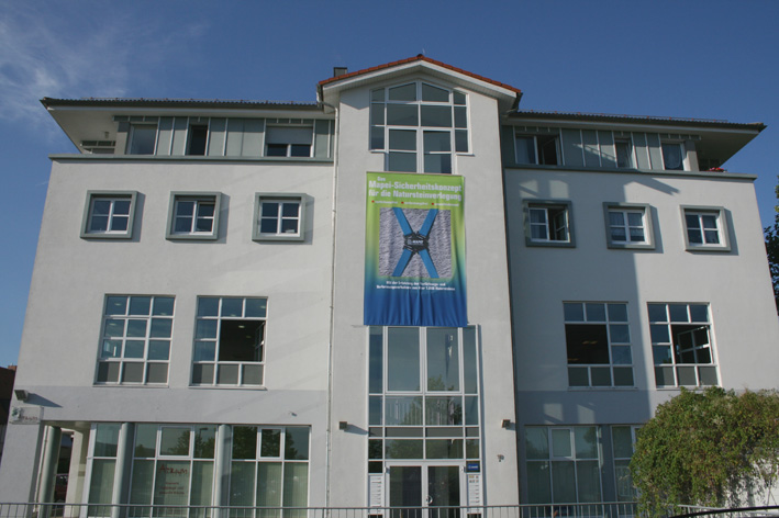 Deutsche Zentrale der Firma MAPEI in Erlenbach